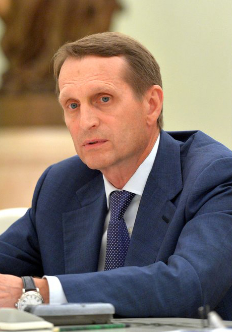 Председатель Государственной Думы Сергей Нарышкин на встрече с руководителями парламентских фракций